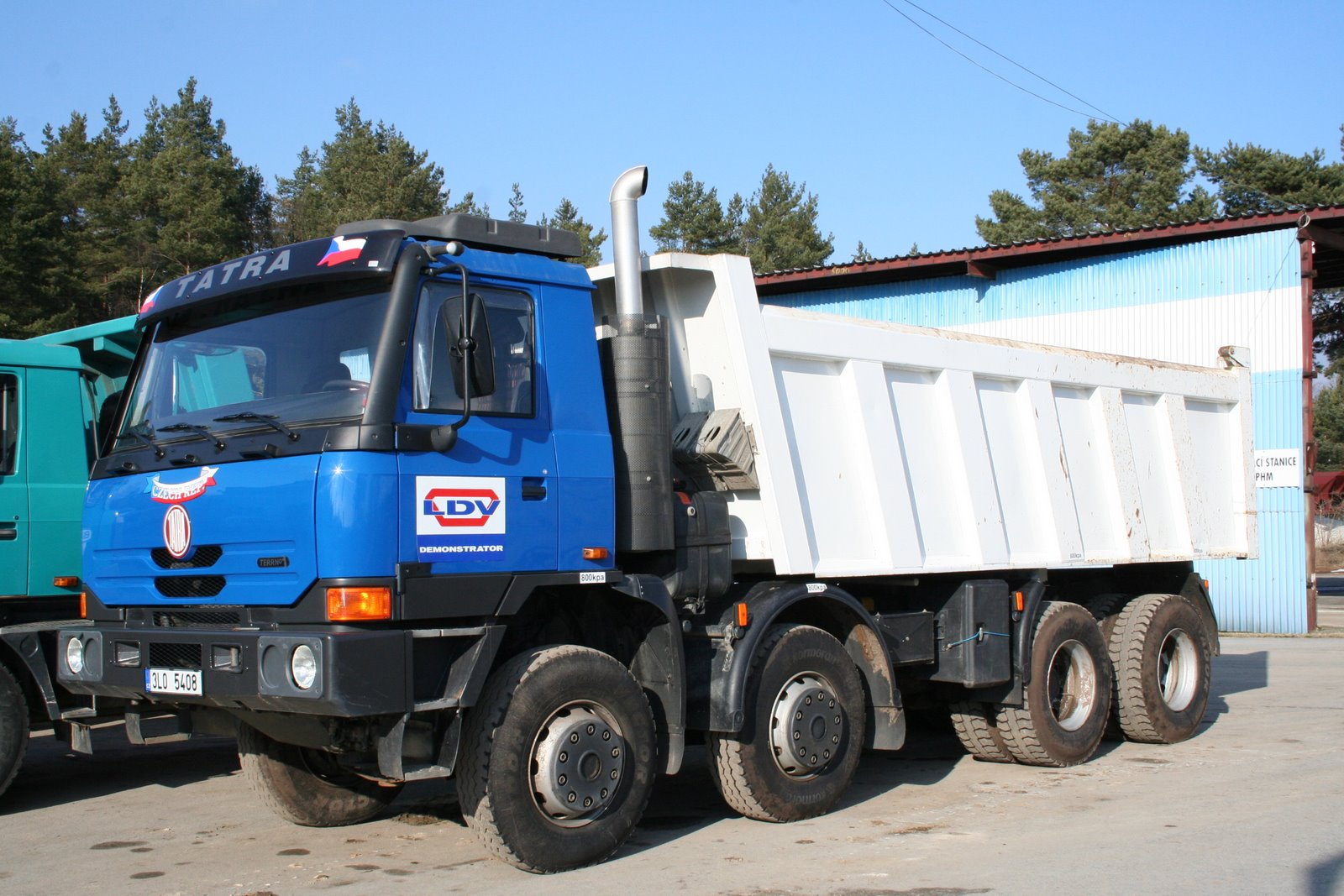 Tatra Terrno 8x8